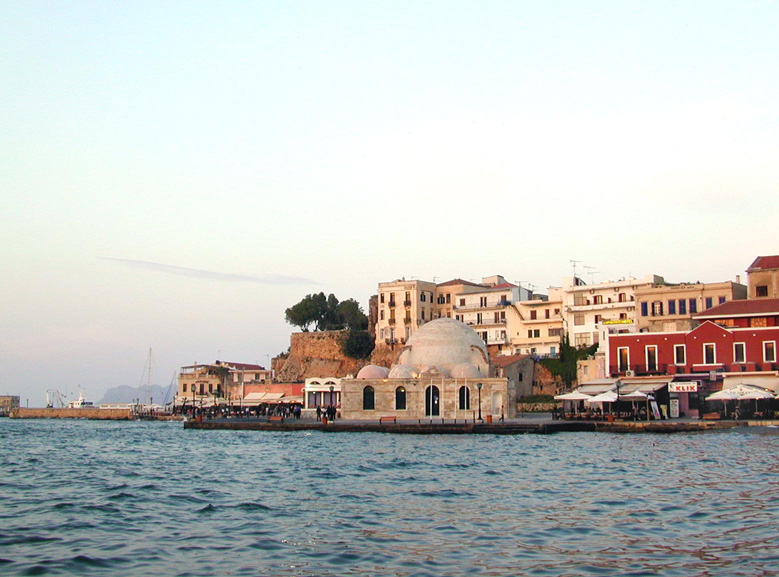 La mosquée turque date de 1645 La Canée est construite sur l'emplacement de la ville antique de Kydonia. Pendant la période néopalatiale, Kydonia est un centre important. Il en est de même durant les périodes romaines et byzantines. Les vénitiens y construisent une forteresse sur la colline qui domine le port, ainsi qu'une cathédrale, un palais, un théâtre et de nombreuses maisons pour les nobles. Des remparts sont élevés en 1537 pour se protéger d'une invasion turque mais la ville est prise par eux en 1645. Aujourd'hui, La Canée est la 2ème ville de Crète, c'est celle qui a le mieux conservé les traces de son passé. (Les photos numériques ont été prises en 2001)